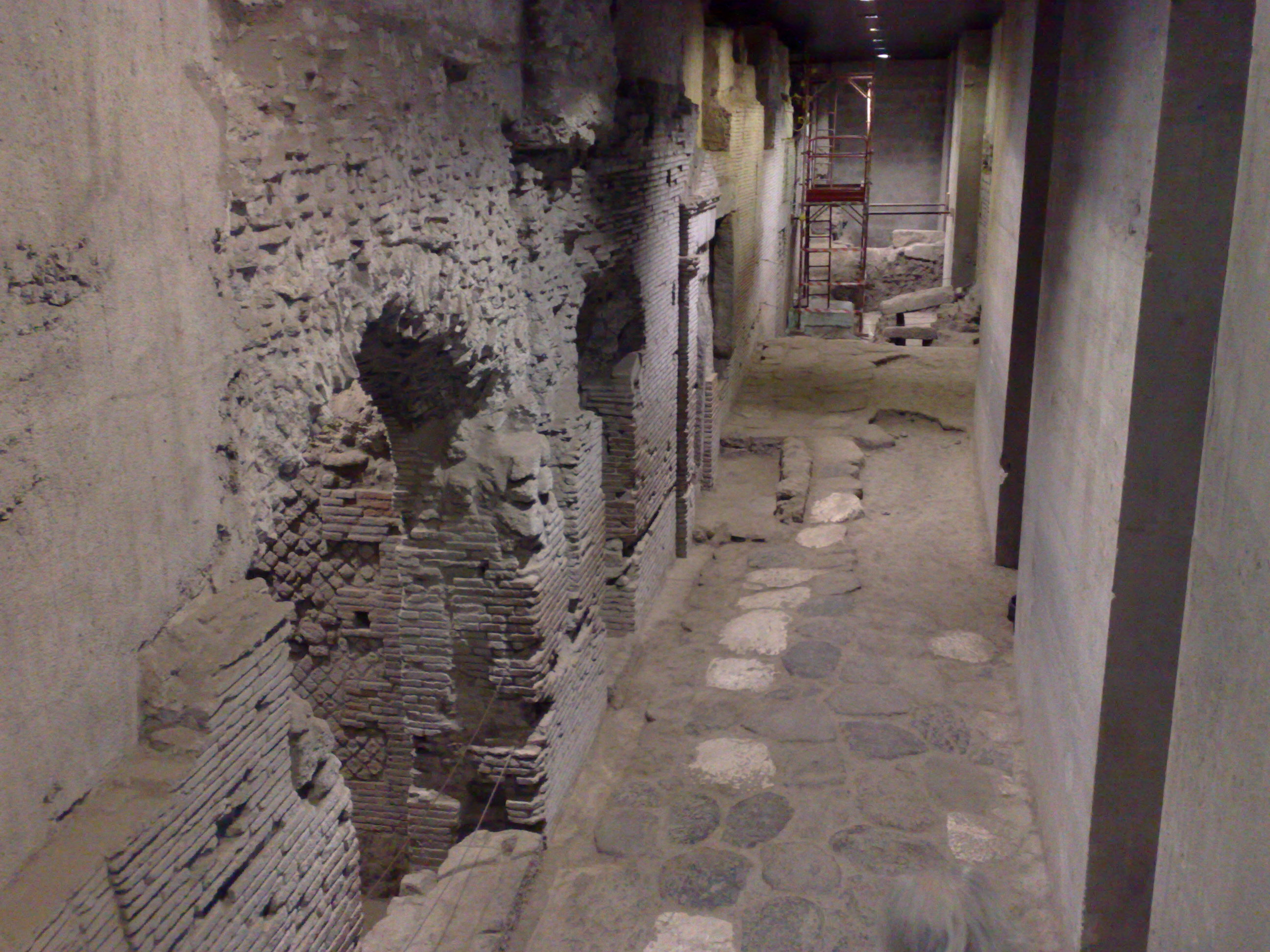 Scavi di San Lorenzo Maggiore (Napoli)